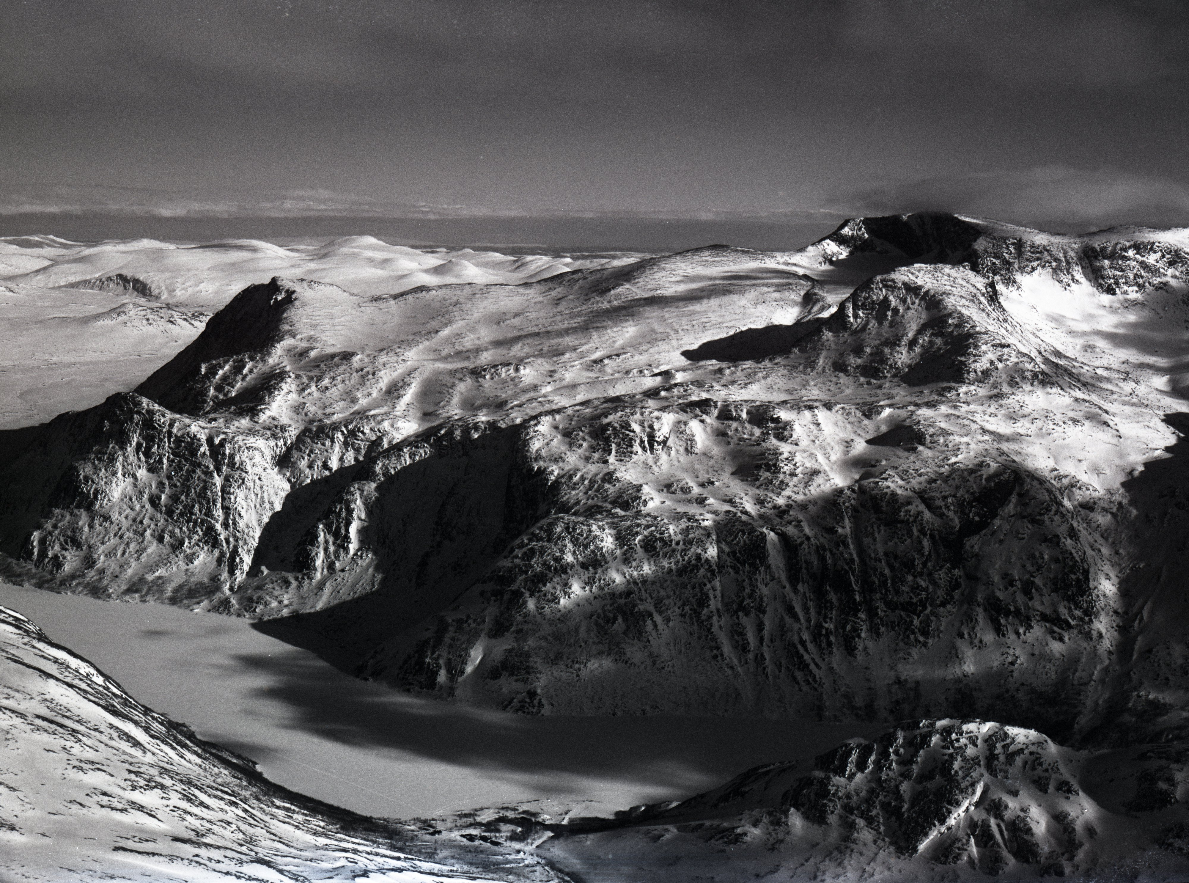 Flyfoto uUt Memurudalen, sørover mot Gjende og Høgdebrotet i bakgrunnen.